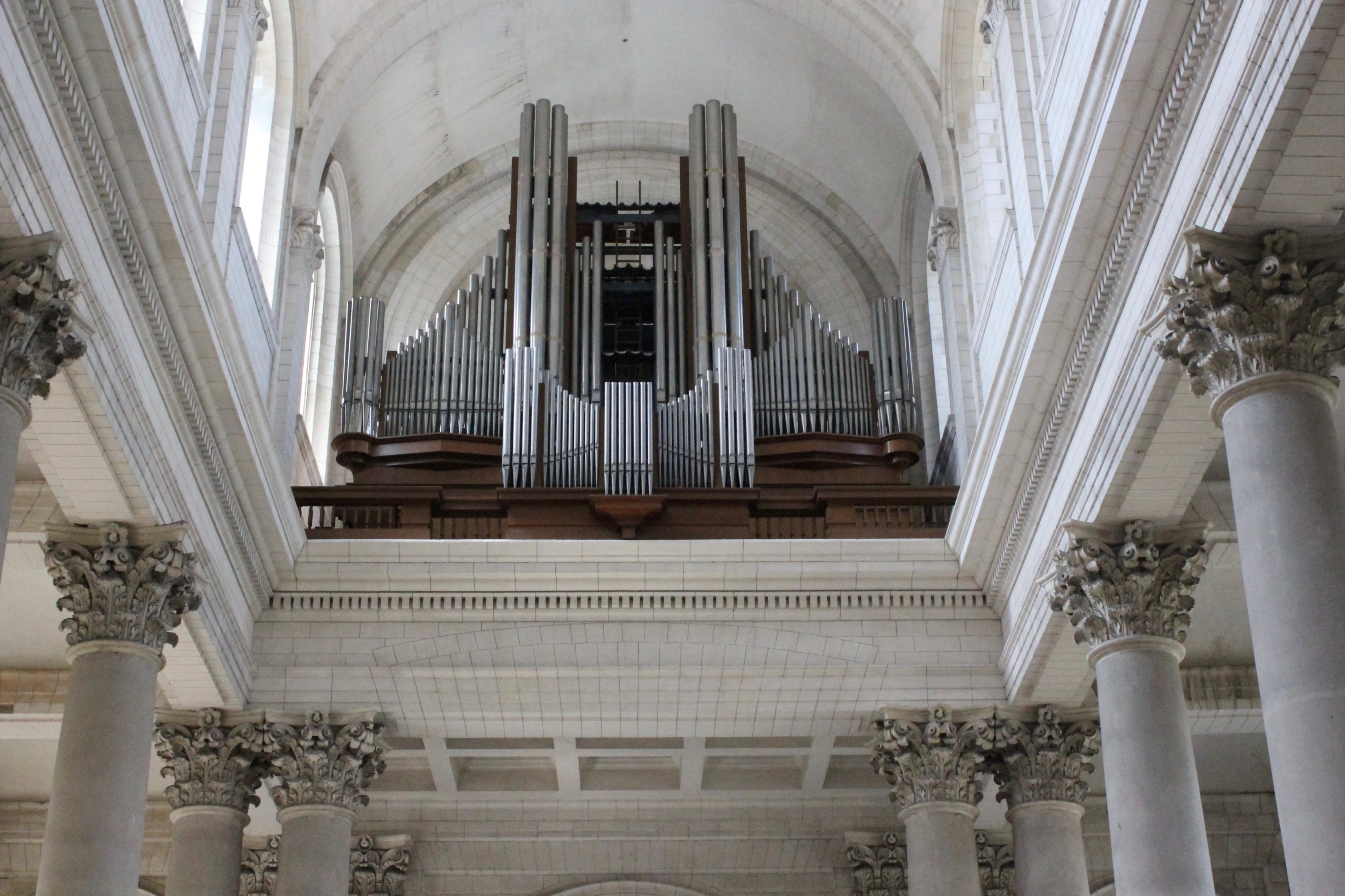 Arras (62) La cathédrale-Les orgues